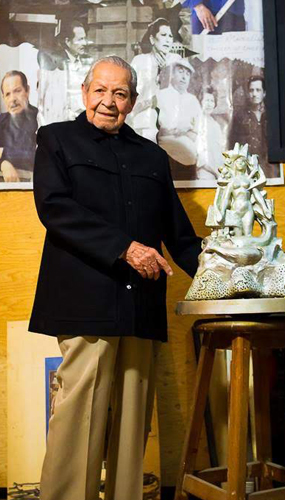 Foto del maestro Salvador Almaraz López